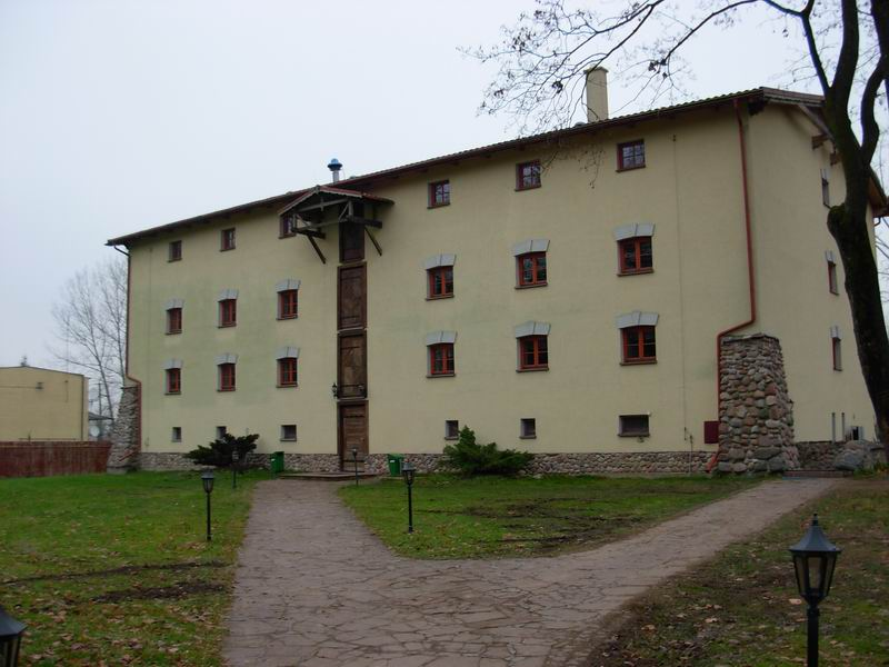 Sterdyń - Palac Ossolińskich - spichlerz